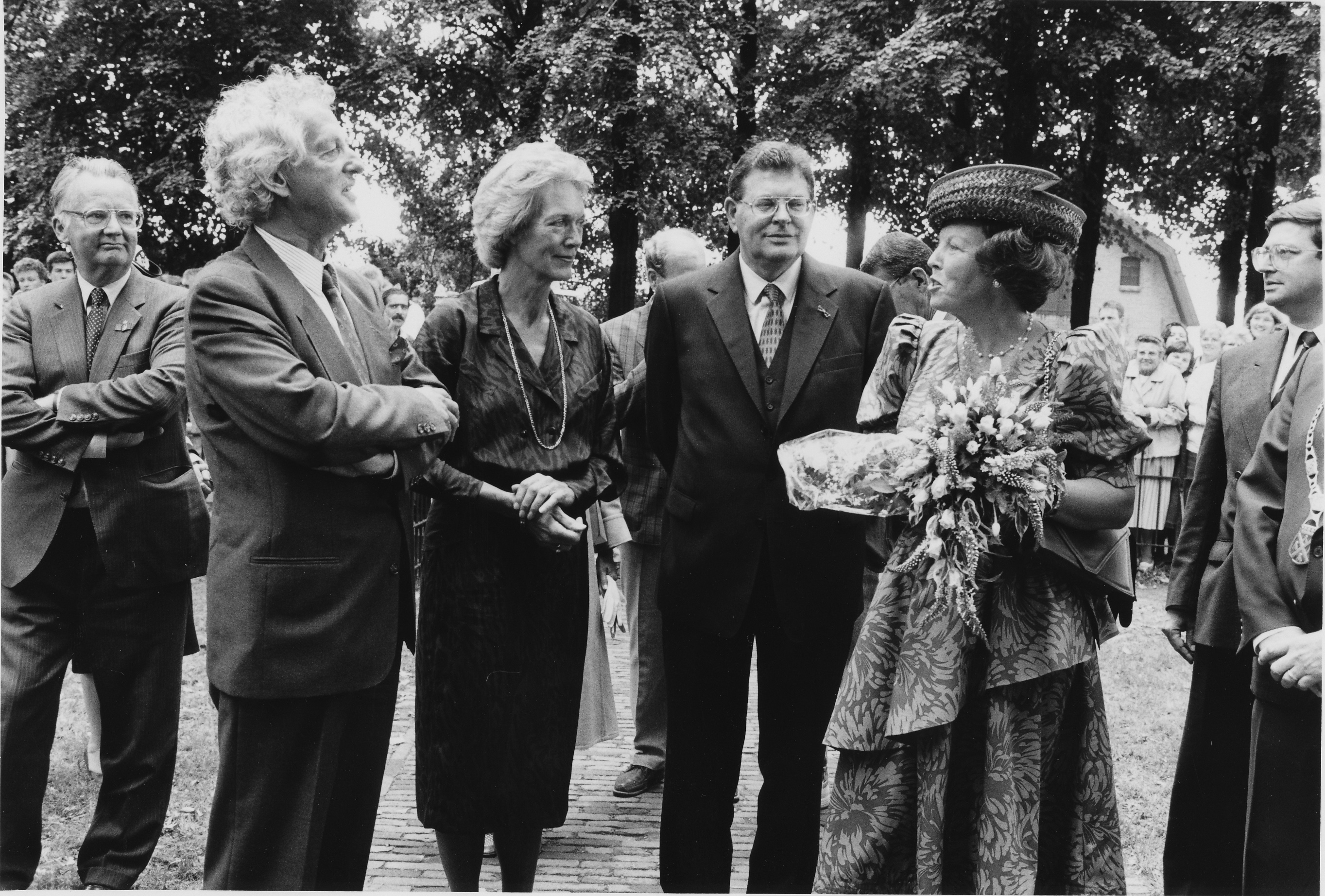 Wijchen/Leur 23-08-1988 Bezoek van Koningin Beatrix aan het Rivierenland. Bezoek aan de NH Kerk in Leur. Midden CdK Matty de Bruijne.